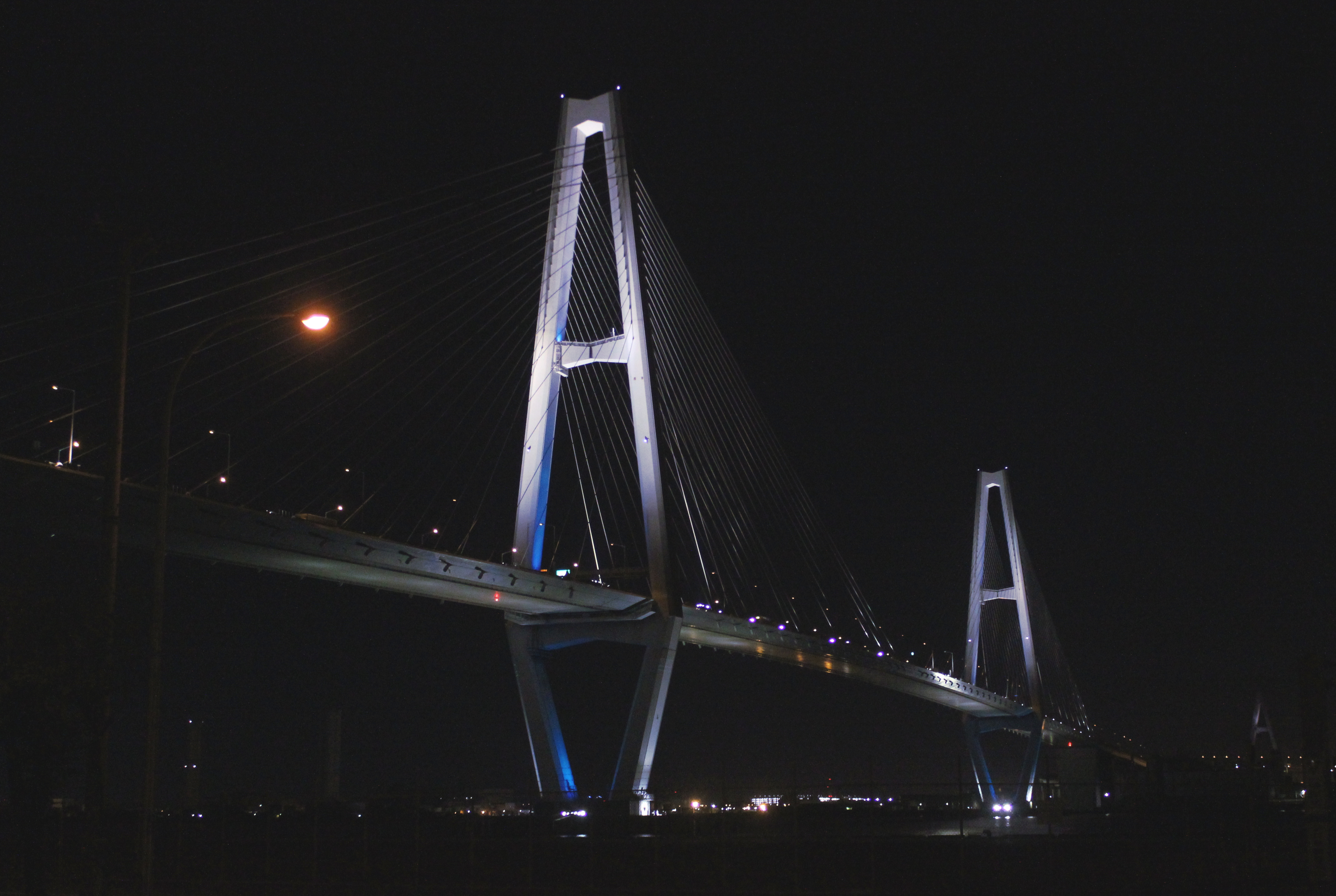 名港中央大橋ライトアップ